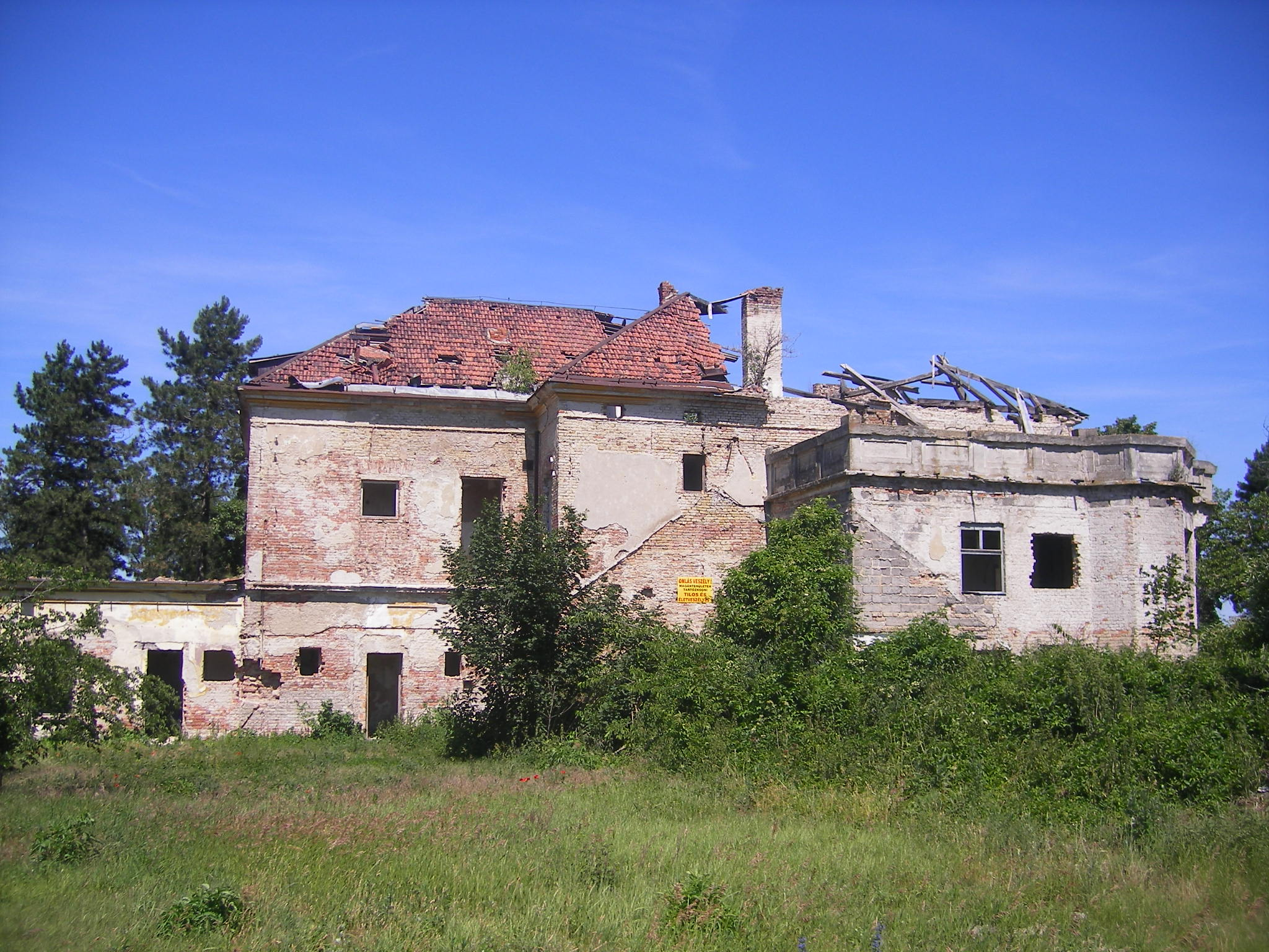 Ács/Concóhát - egykori Degenfeld-Schonburg-kastély